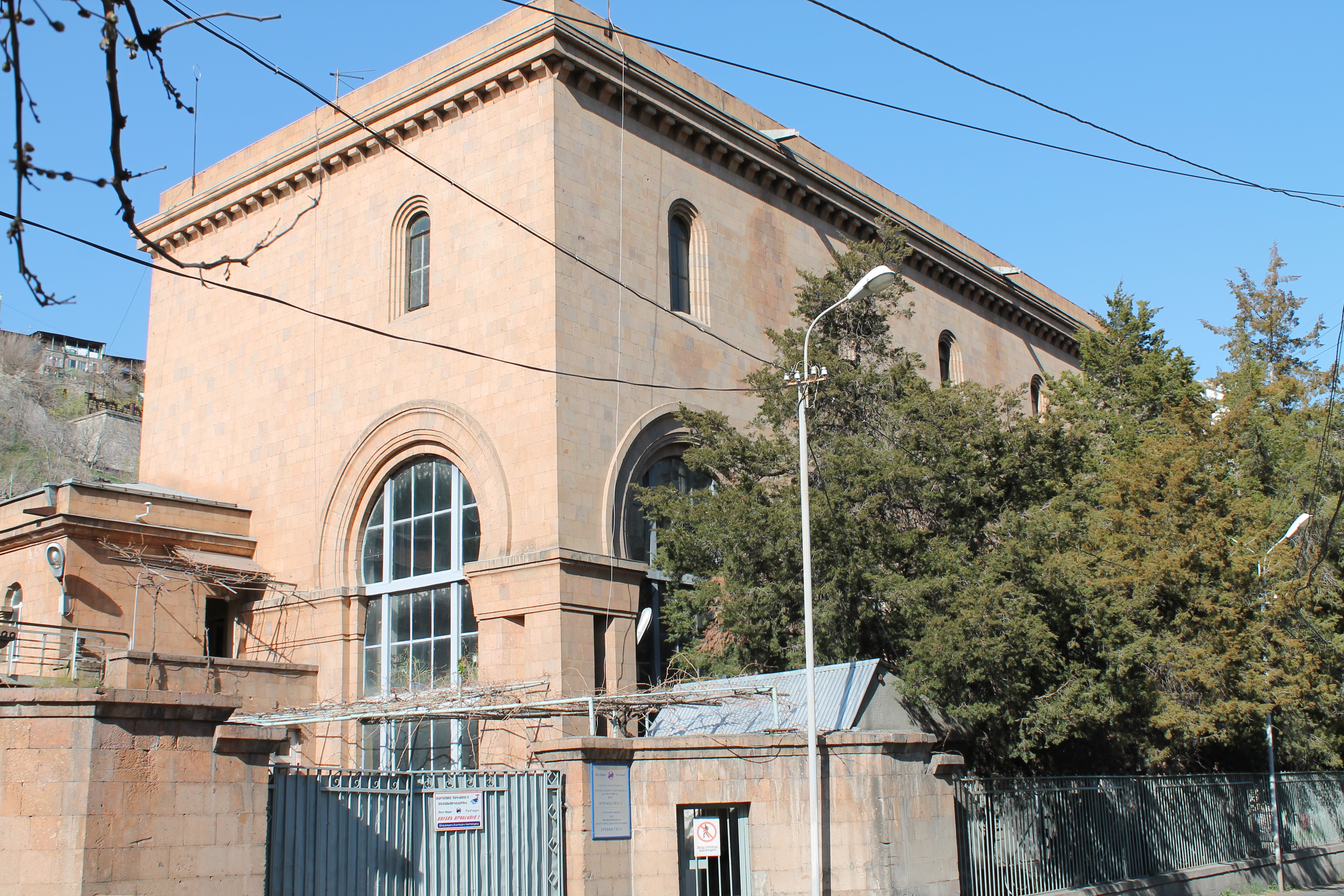 Здание Ереванской ГЭС-1